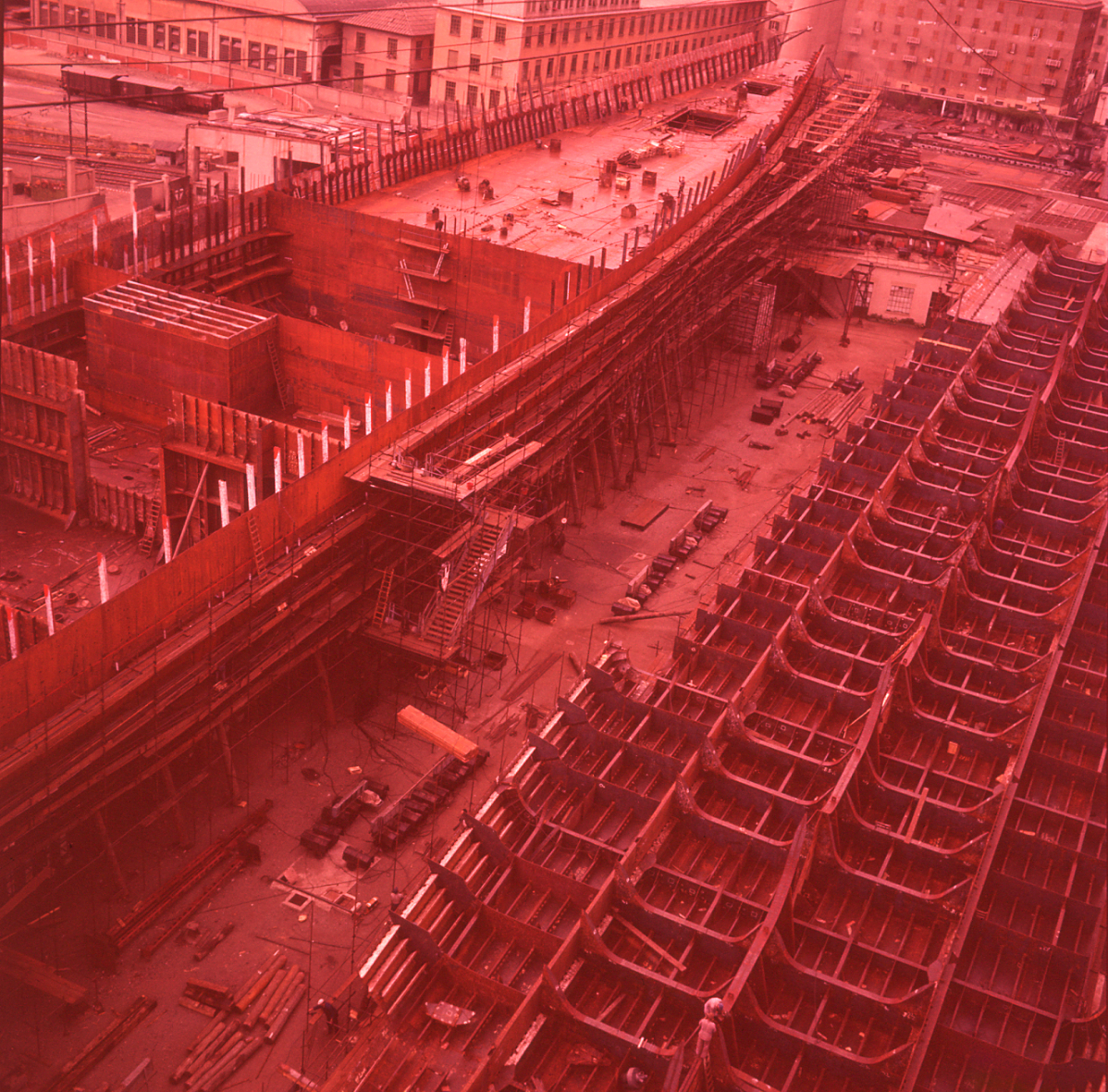 Genova. Cantiere Ansaldo. Servizio fotografico : Genova, 1965 / Paolo Monti. - Buste: 6, Fototipi: 6 : Diapositiva, sviluppo cromogeno/ pellicola ; 6x6. - ((Serie costituita da 6 diapositive identificate con i nn.: 944-949. Sulla busta RC944 manoscritto: "Genova Ansaldo". La suddetta serie è contenuta nella scatola identificata con la numerazione RC938/1098. Sul coperchio della scatola manoscritto: "Località varie - Nord".